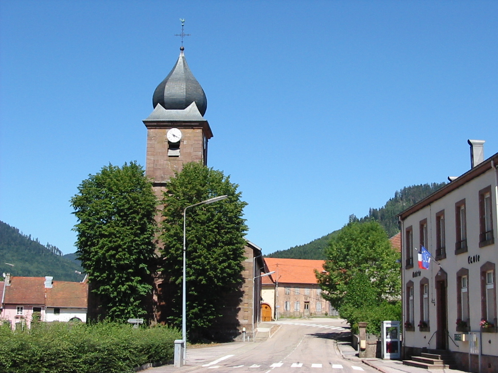 Luvigny Le centre : église, mairie-école Commune du canton de Raon-l'Étape (Vosges) Photo personnelle du 17 juillet 2006. Copyright © Christian Amet